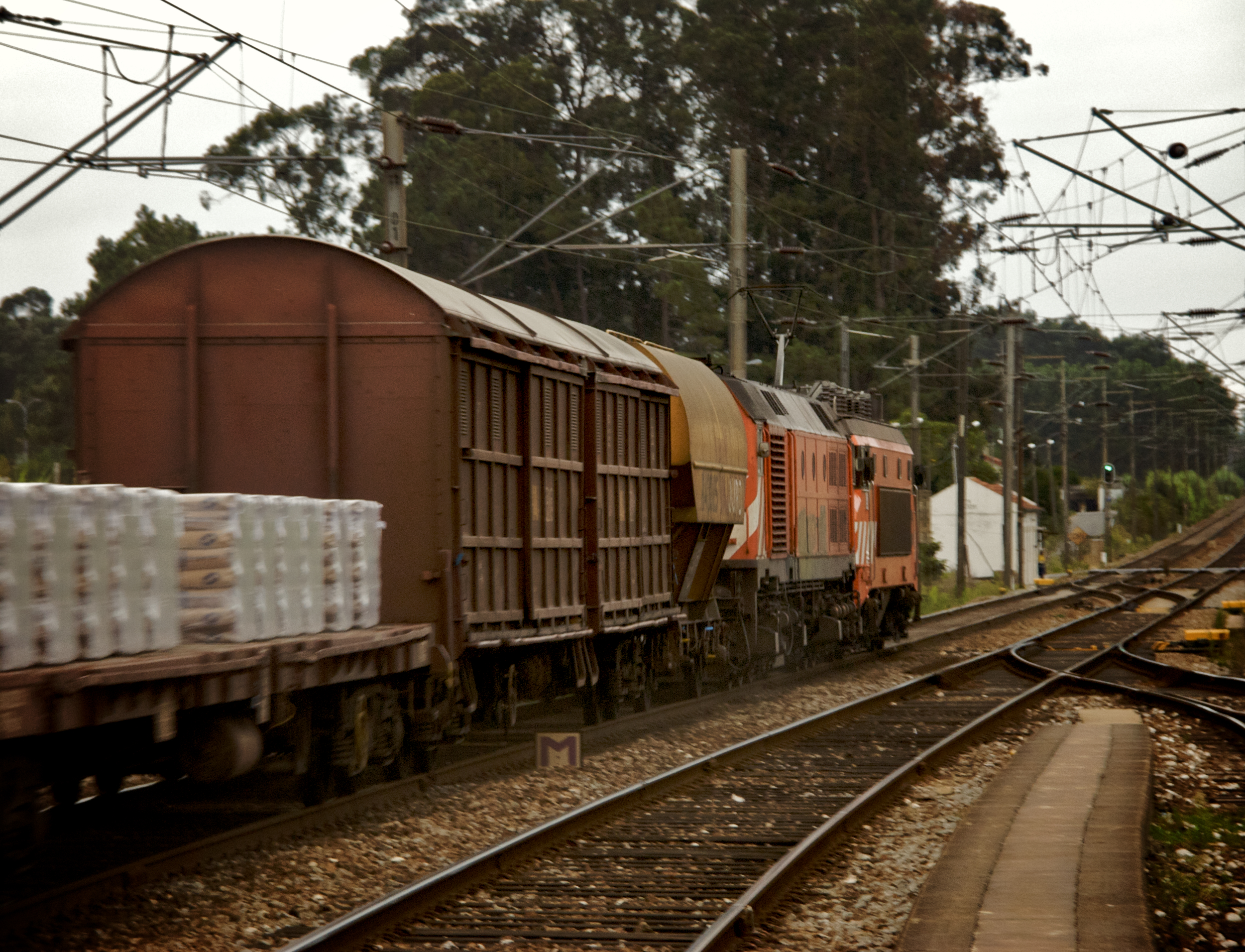 Tipo: Comboio Eixo 51033 [Pampilhosa - Vila Nova de Gaia] Local: Estação de Ovar [Linha do Norte, PK 300] Data e hora: 3 de Setembro de 2008 [19h13] Material: Locomotivas 2611 e 1968 + 10 vagões (1 CP Tgpps + 5 CP Gabs + 4 CP Rlps)